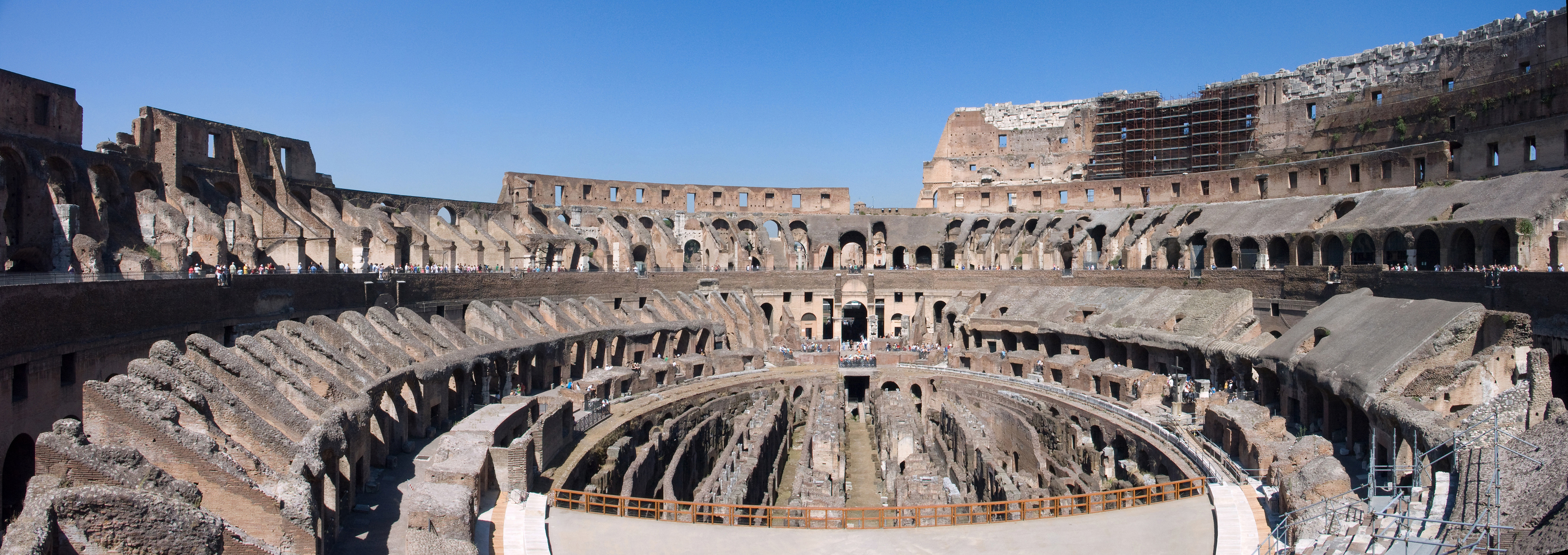 Colisée de Rome, vue de l'intérieur. Panorama